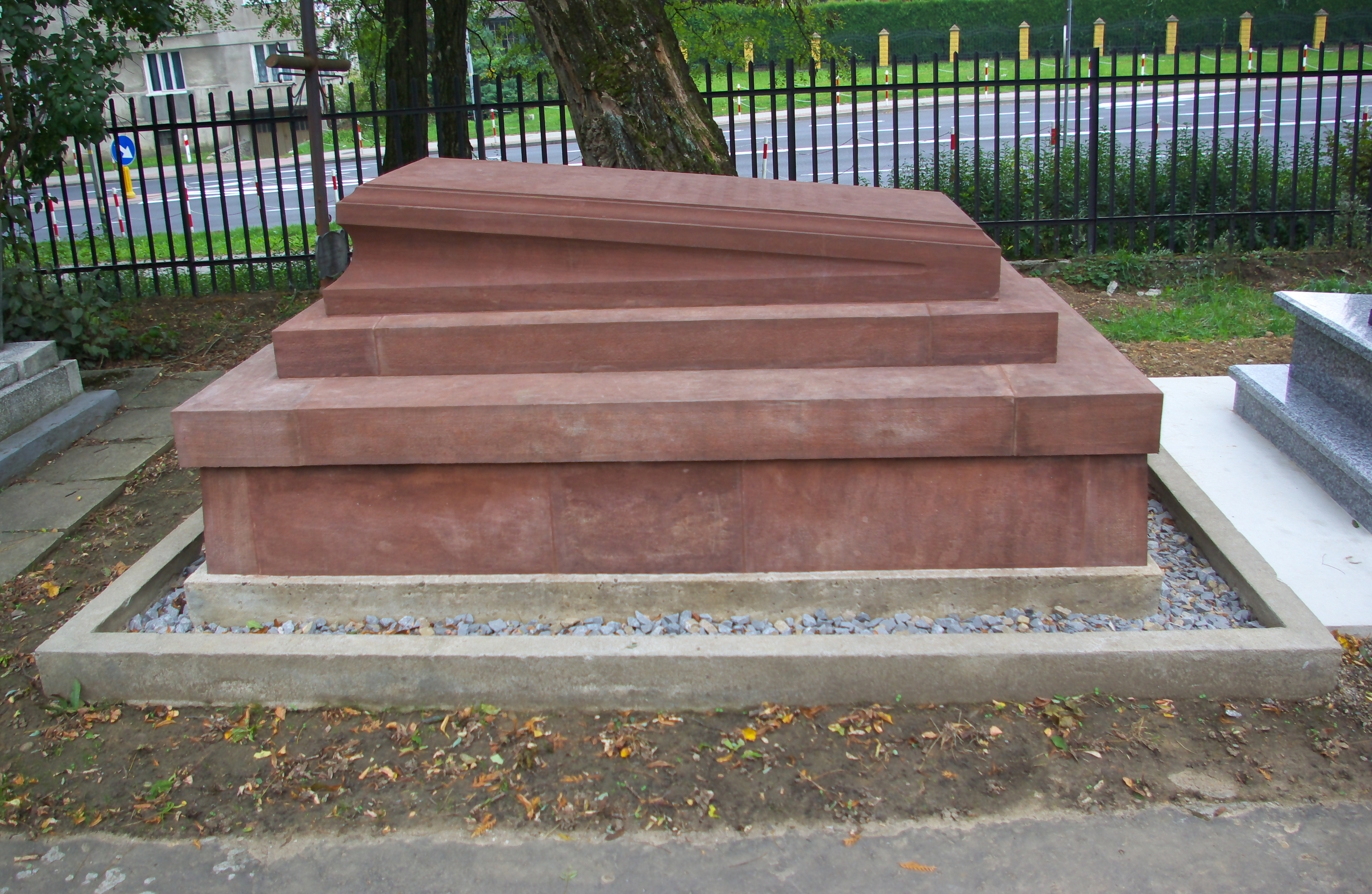 Grobowiec Feliksa Gieli na Cmentarzu Centralnym w Sanoku po renowacji w 2015